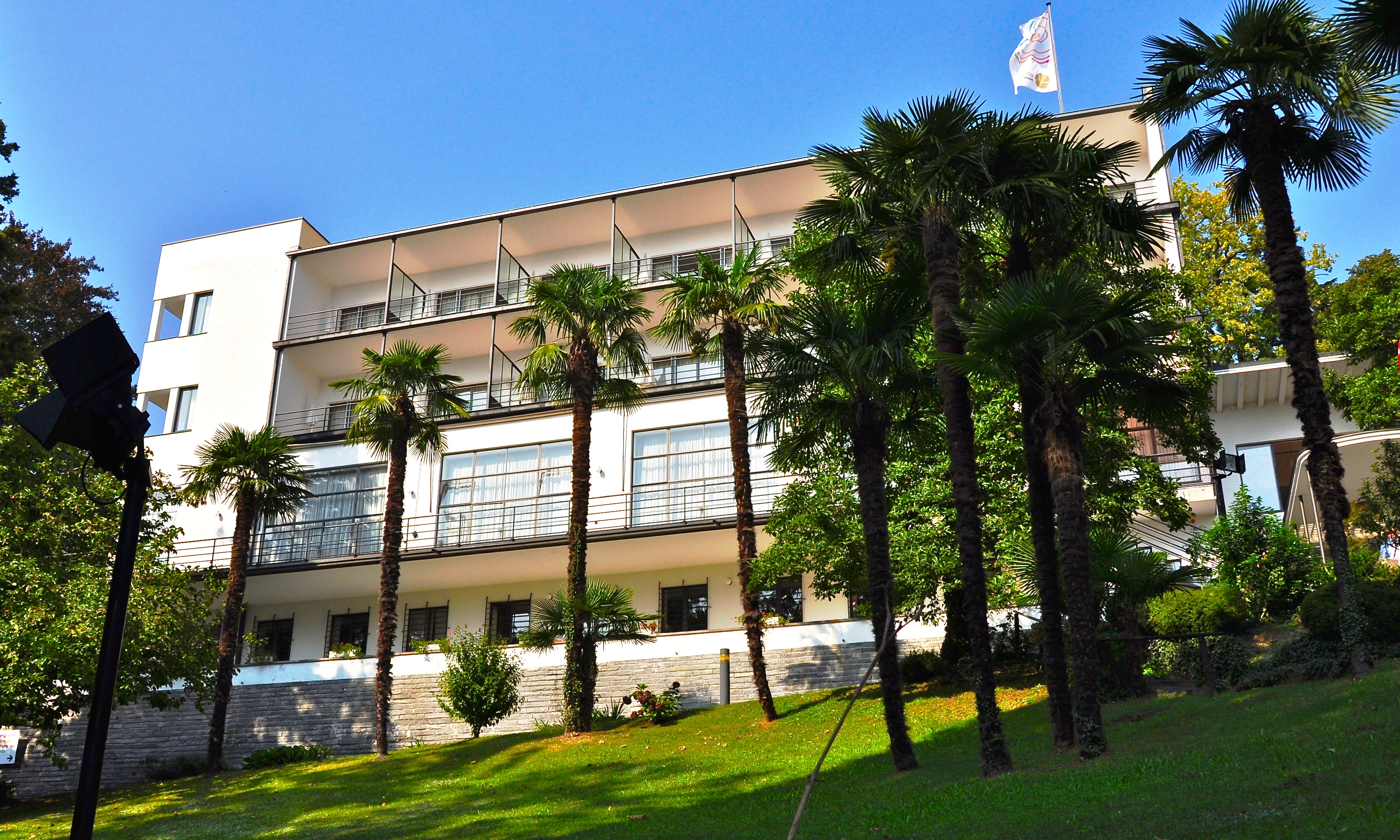 Nel 1928 il Barone von der Heydt fece poi costruire il nuovo albergo in puro stile Bauhaus dall'architetto tedesco Emil Fahrenkamp